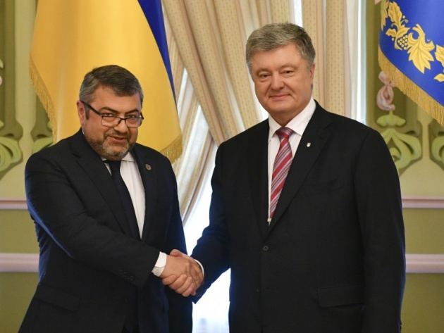 Президент України Петро Порошенко прийняв вірчі грамоти у послів низки іноземних держав: Вірменії - Тигран Сейранян